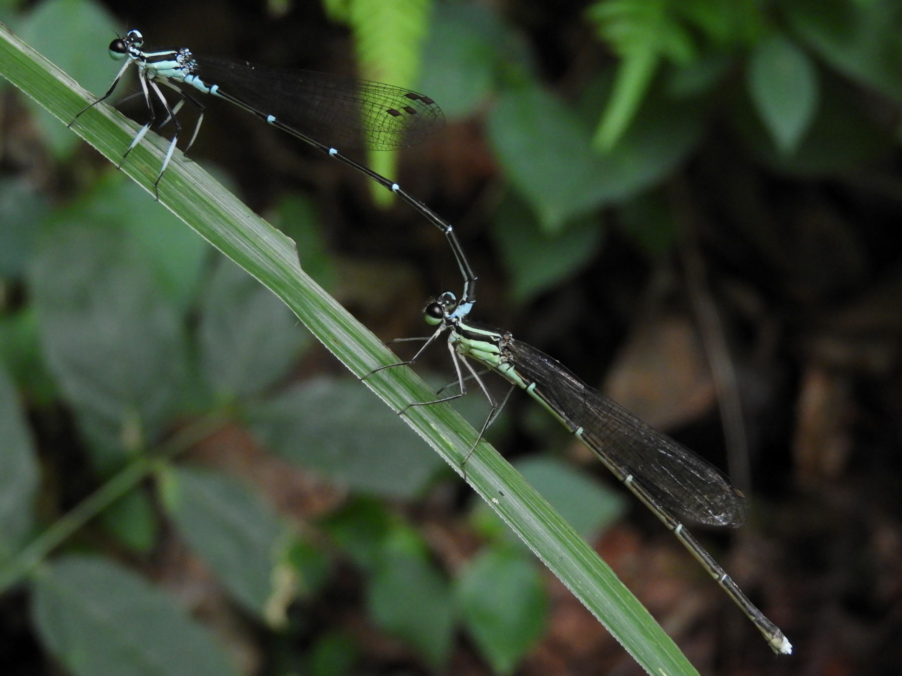 モノサシトンボ、ペア、広島県